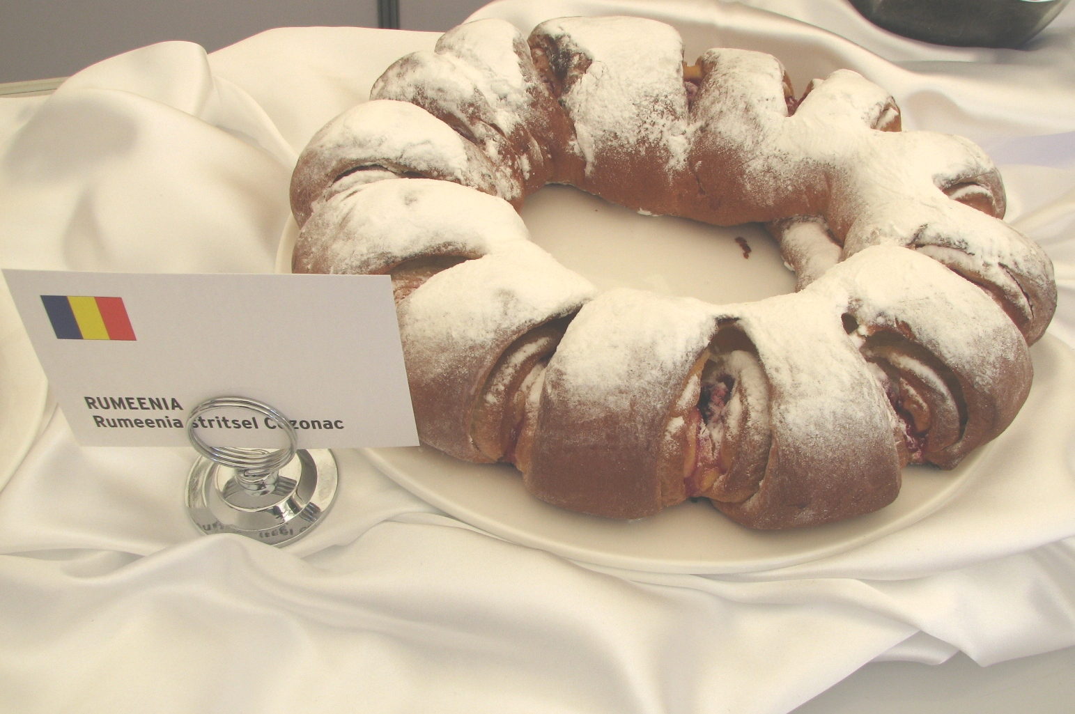 Cozonac'i pakuti Euroopa telgis vabaduse väljakul Euroopa päeva tähistamisel 2011